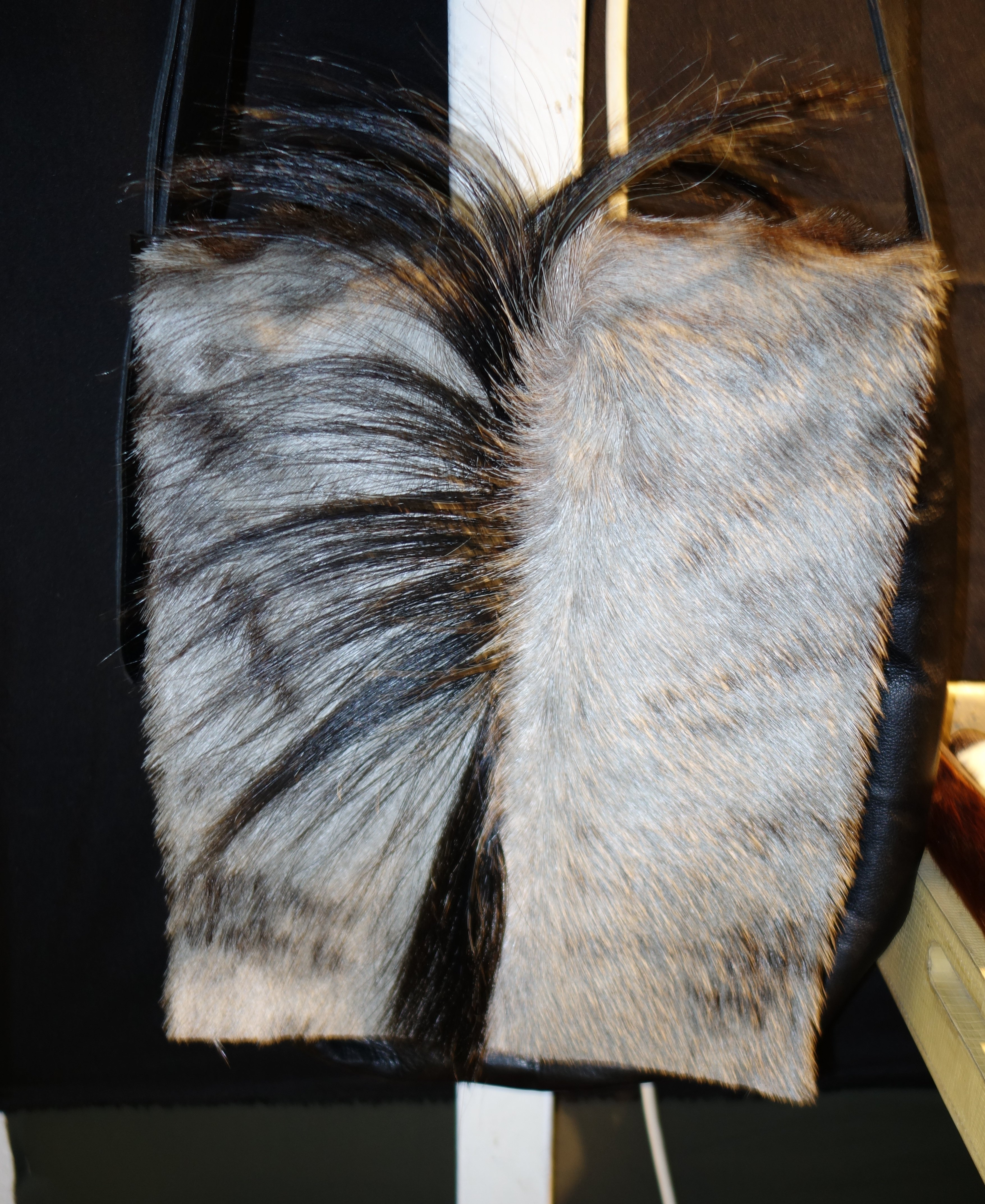 Umhängetasche aus naturfarbenem Gnufell. Am Messestand von Justin Hodge, Kapstadt. Gesehen auf der Messe „Jagd und Hund“, Dortmund Westfalenhallen, 3. bis 9. Februar 2014.